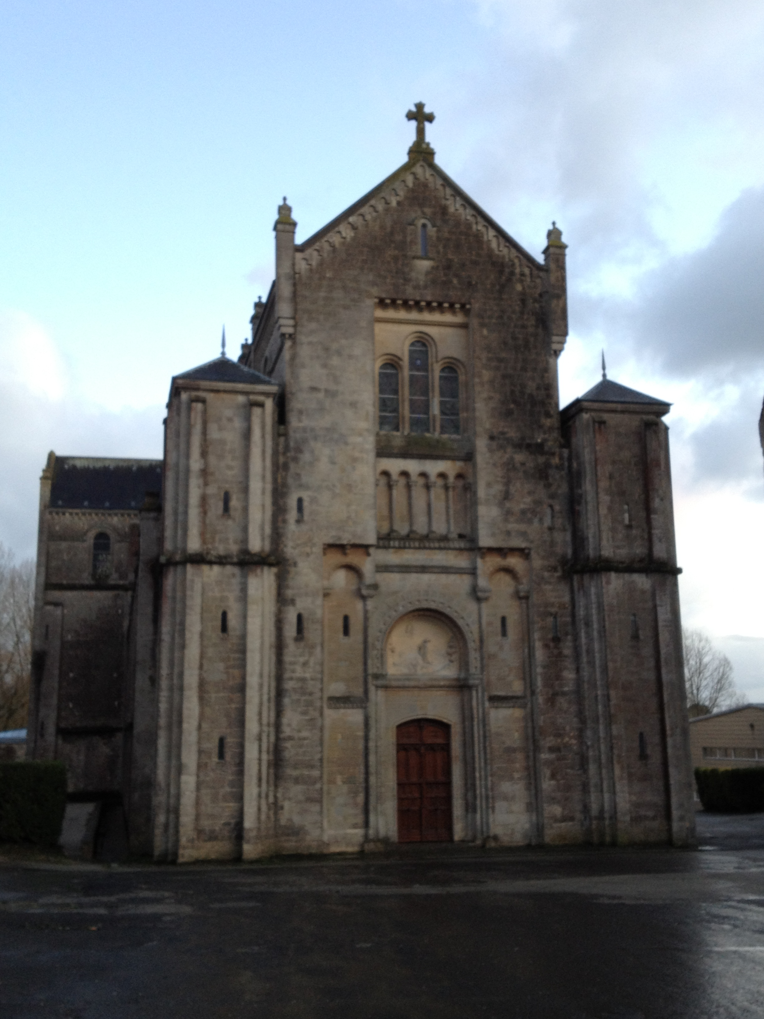 Façade de l'abbatiale de Montebourg